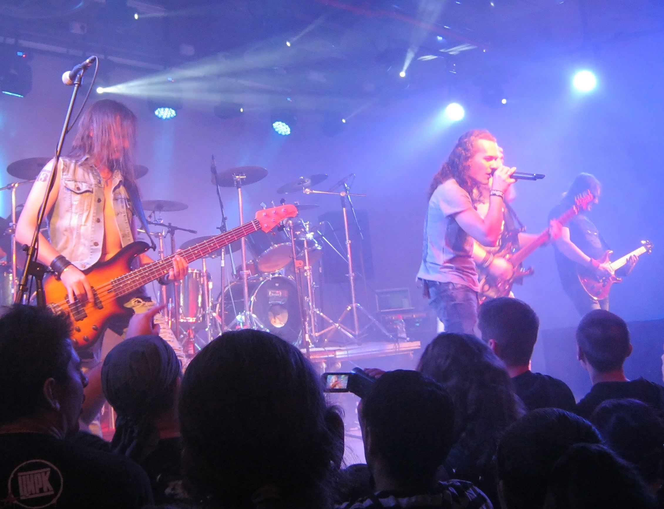 Russian Power Metal band Epidemia in Israel, 2015